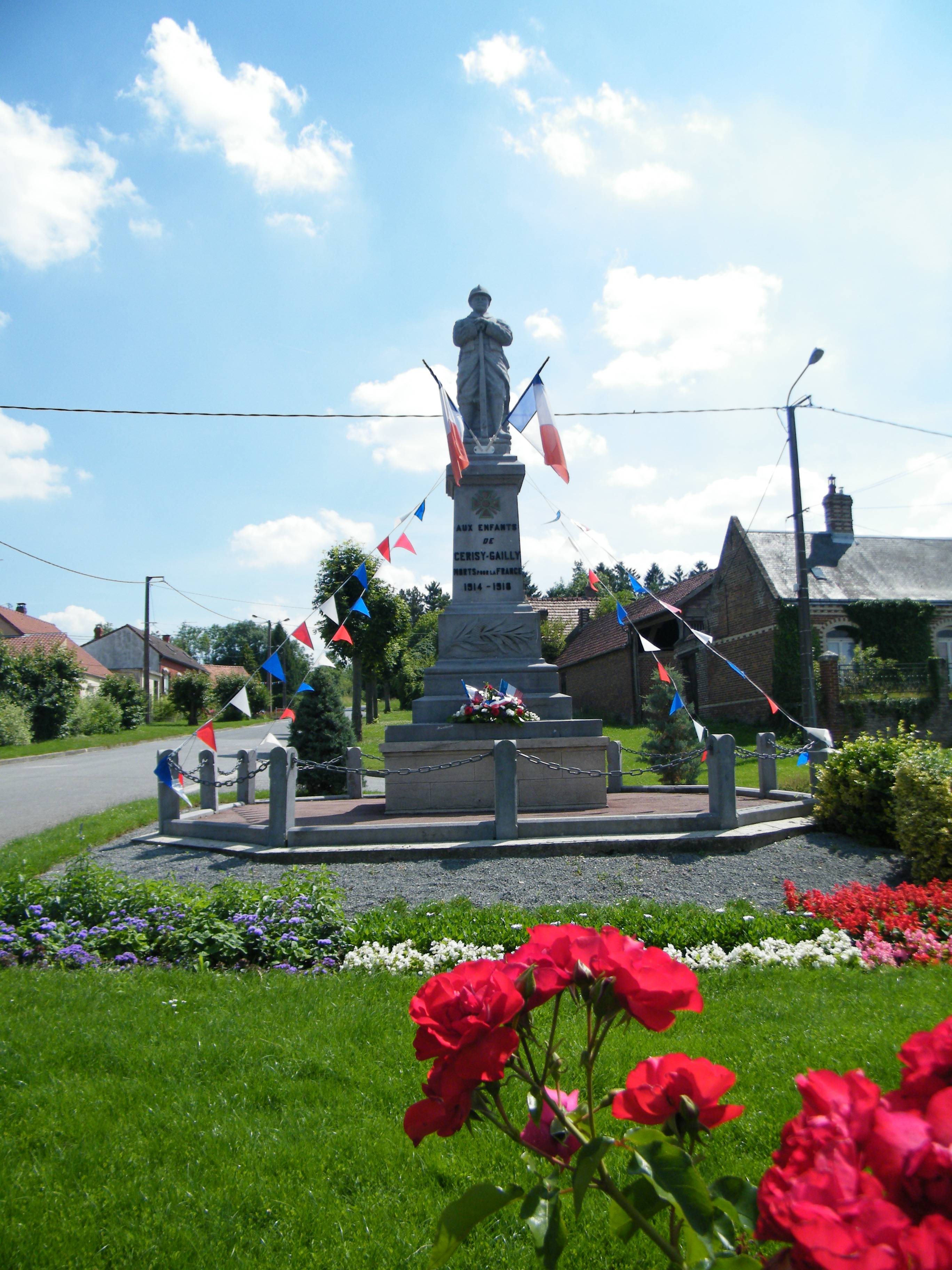 Monument 1914-1918.